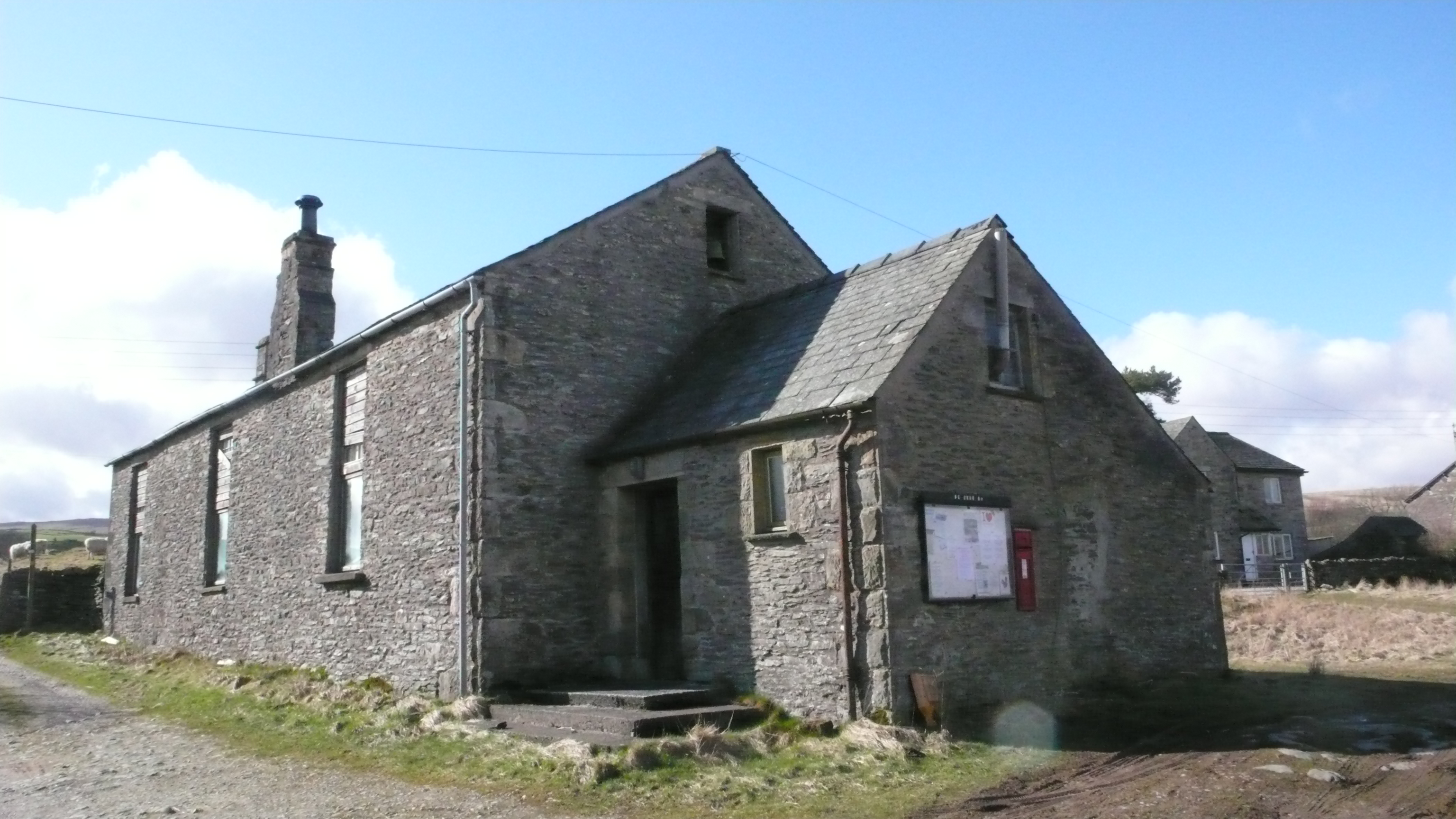 Greenholme School